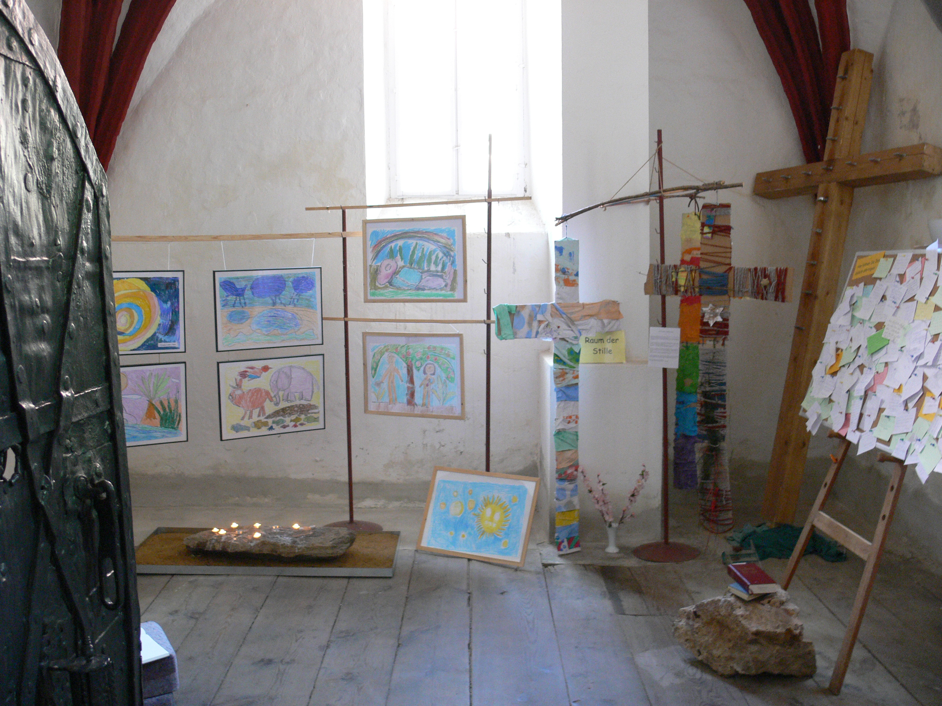 Luckau, Landkreis Dahme-Spreewald, Brandenburg St..-Nikolai-Kirche "Raum der Stille" in einer Seitenkapelle